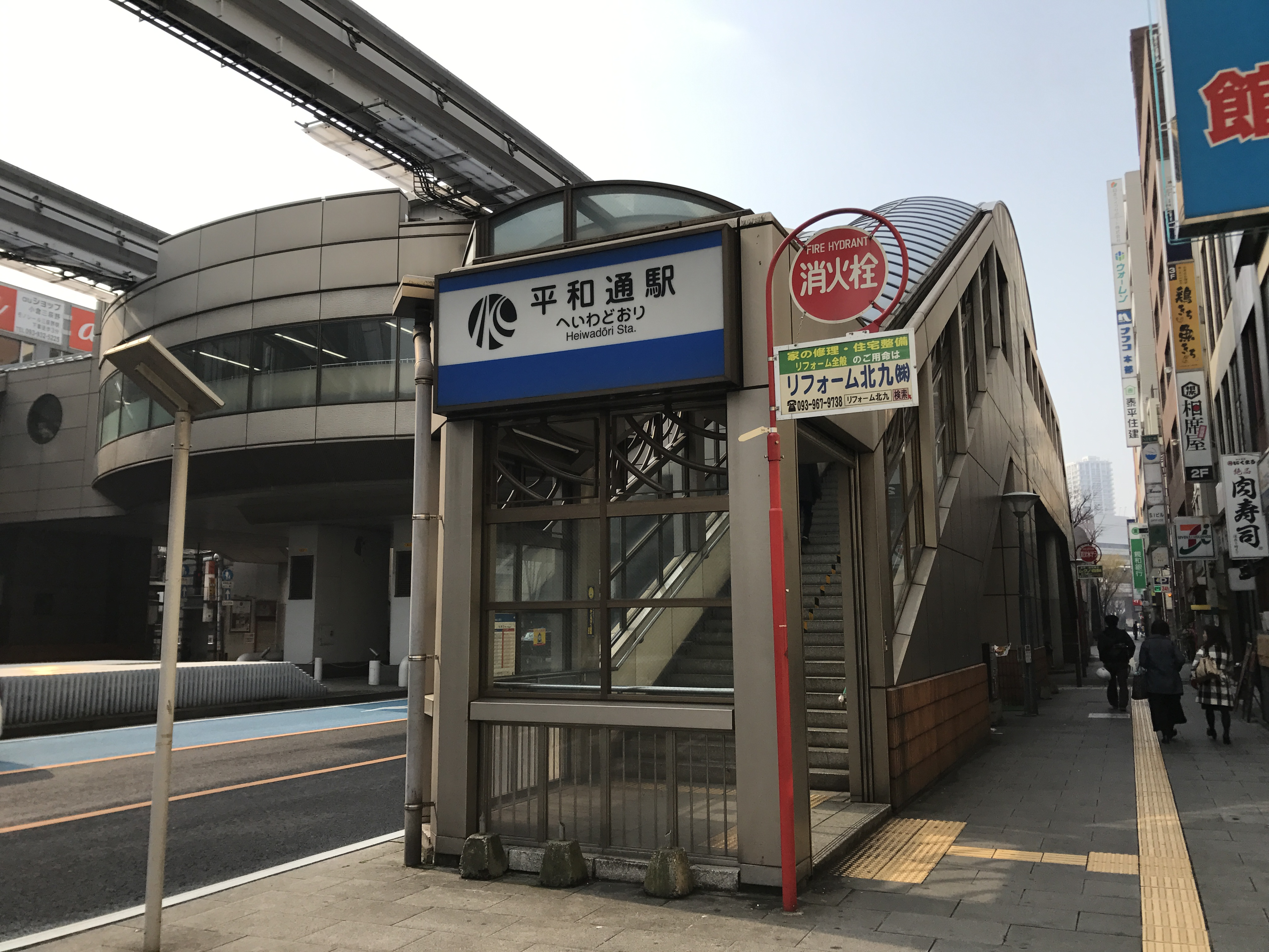 平和通駅の6番出入り口